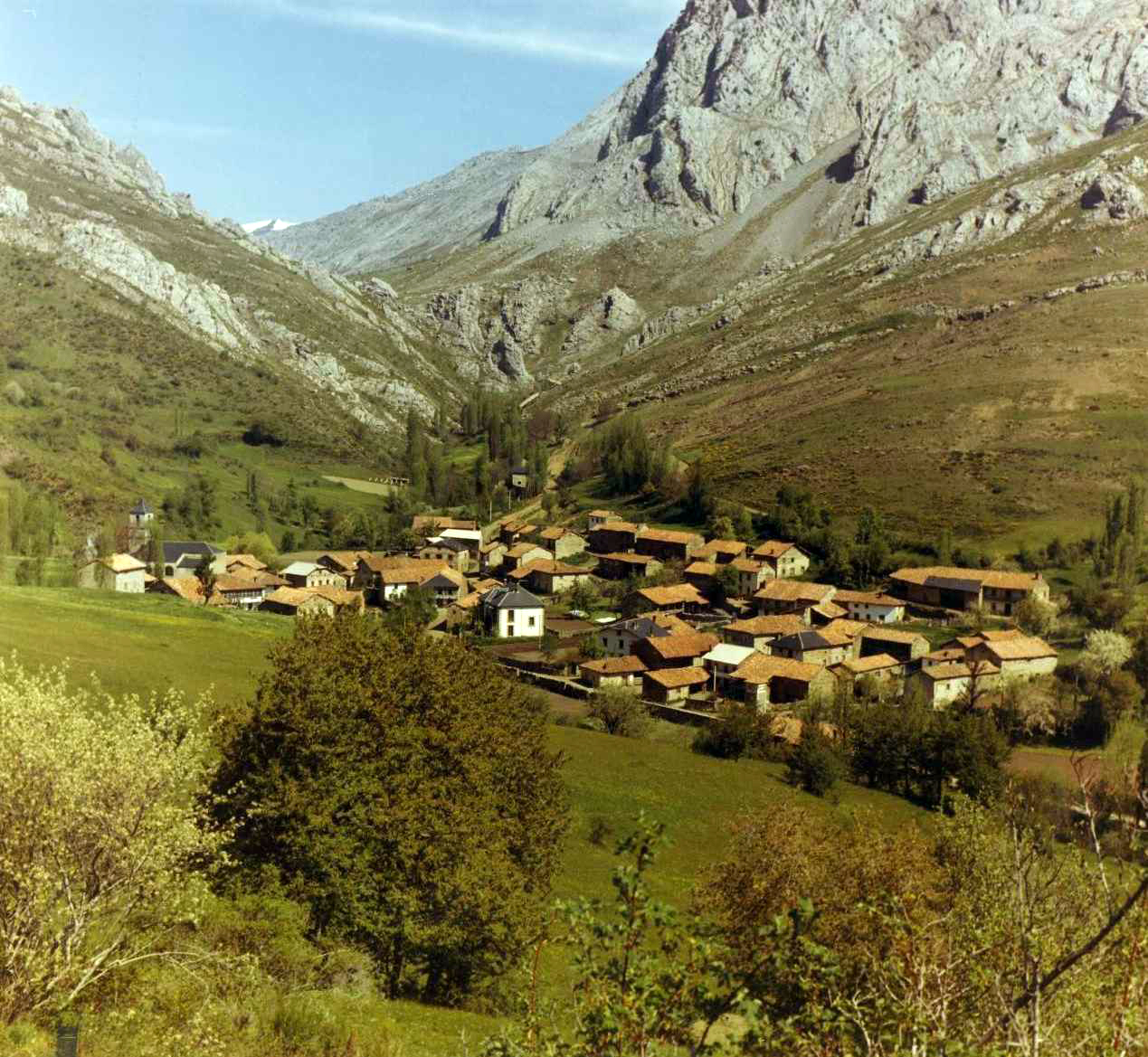 Pueblo de Anciles. Demolido en 1987 por el gobierno de España